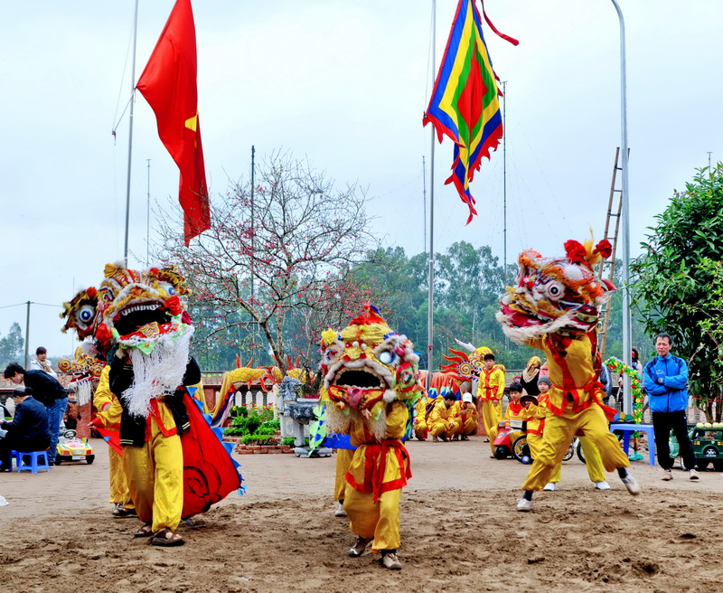 Múa lân trong lễ hội làng Triều Khúc